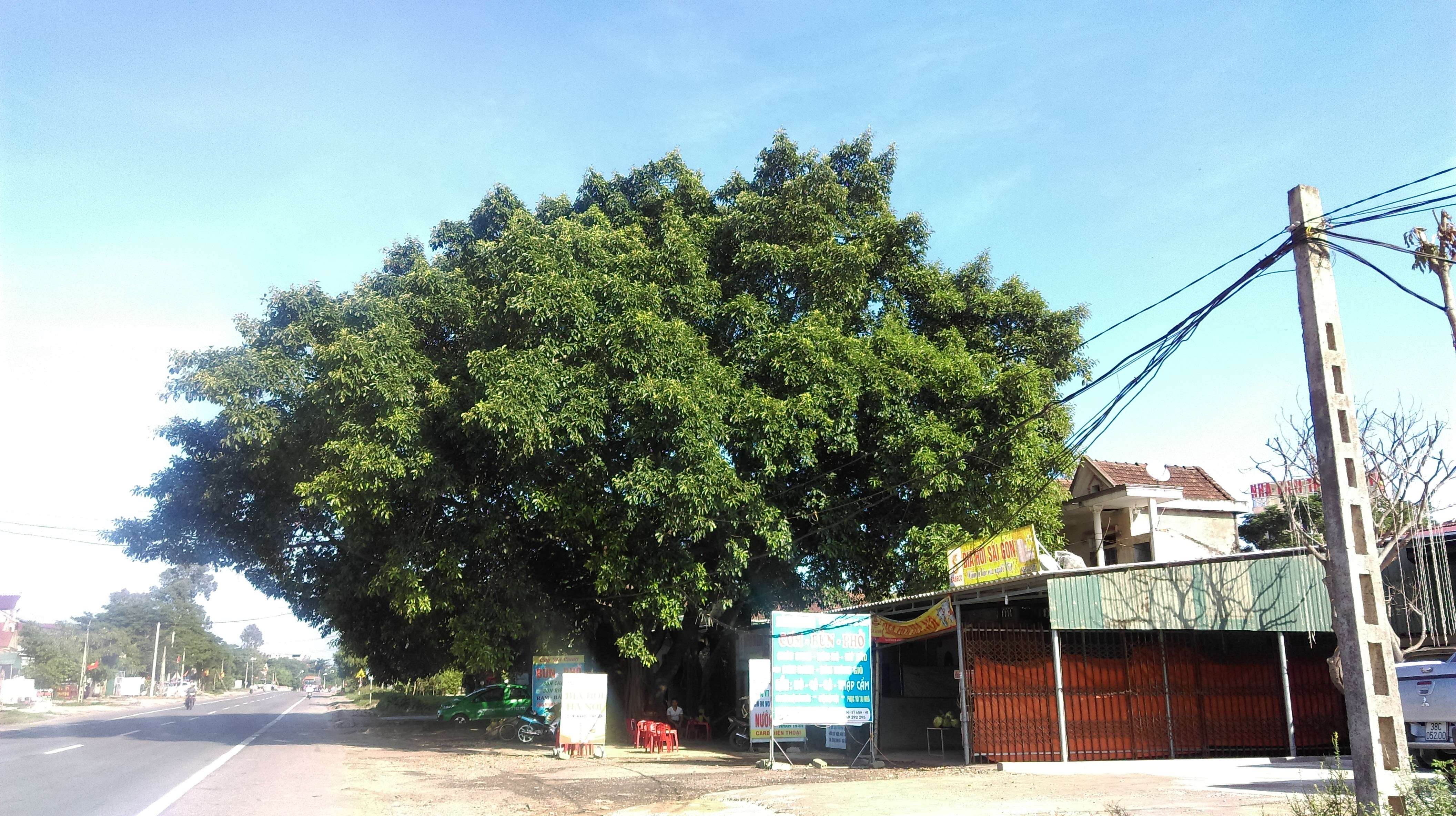 Cây đa Kỳ Trinh, Kỳ Anh, Hà Tĩnh